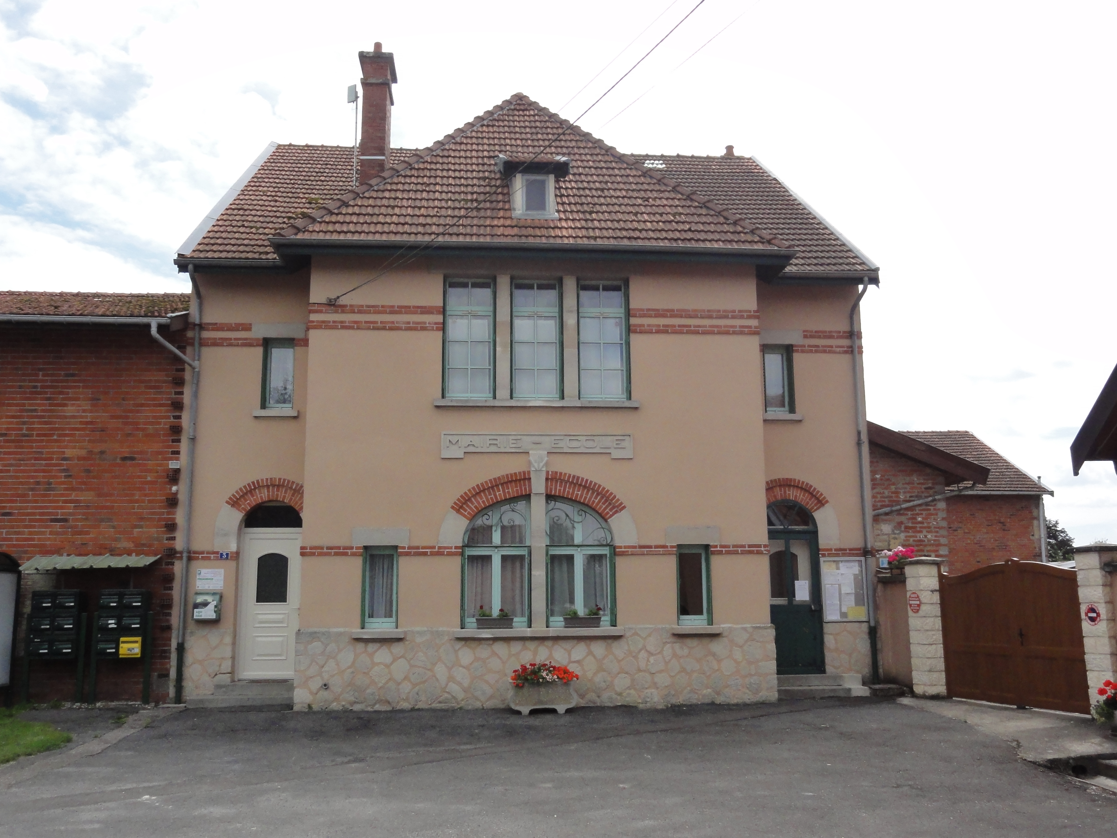 Remennecourt (Meuse) mairie-école